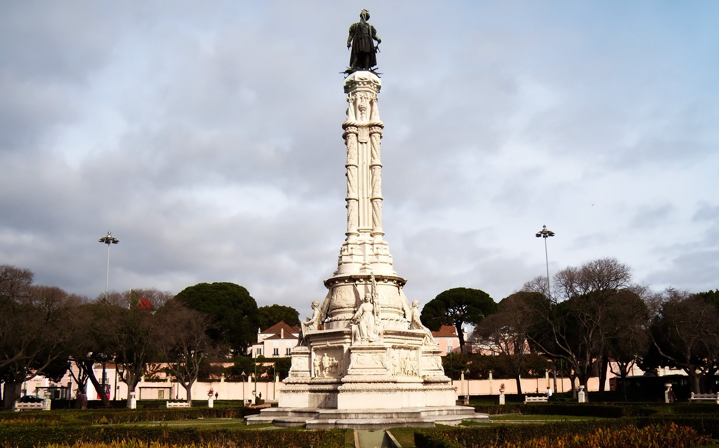 Памятник герцогу Афонсу д’Албукерке